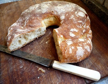 Maltese Ftira Bread